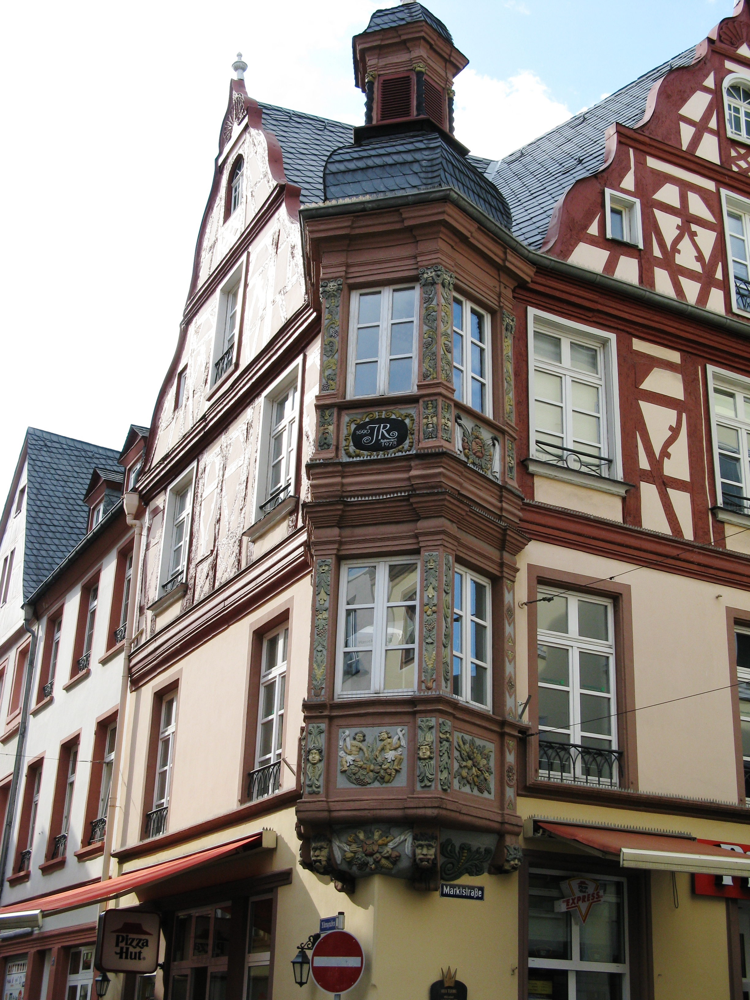 Die vier Türme (Turm 1: Vier einander gegenüberliegende Eckhäuser mit kunstvollen Erkertürmen, Koblenz (Rhein), Kreuzung Löhrstraße / Marktstraße, Alter Graben)